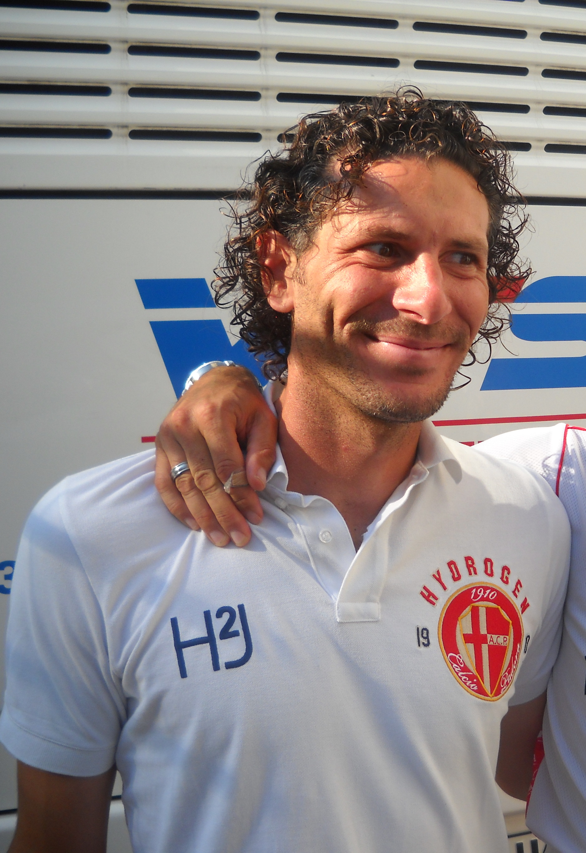 L'ex calciatore e allenatore italiano Alessandro Dal Canto